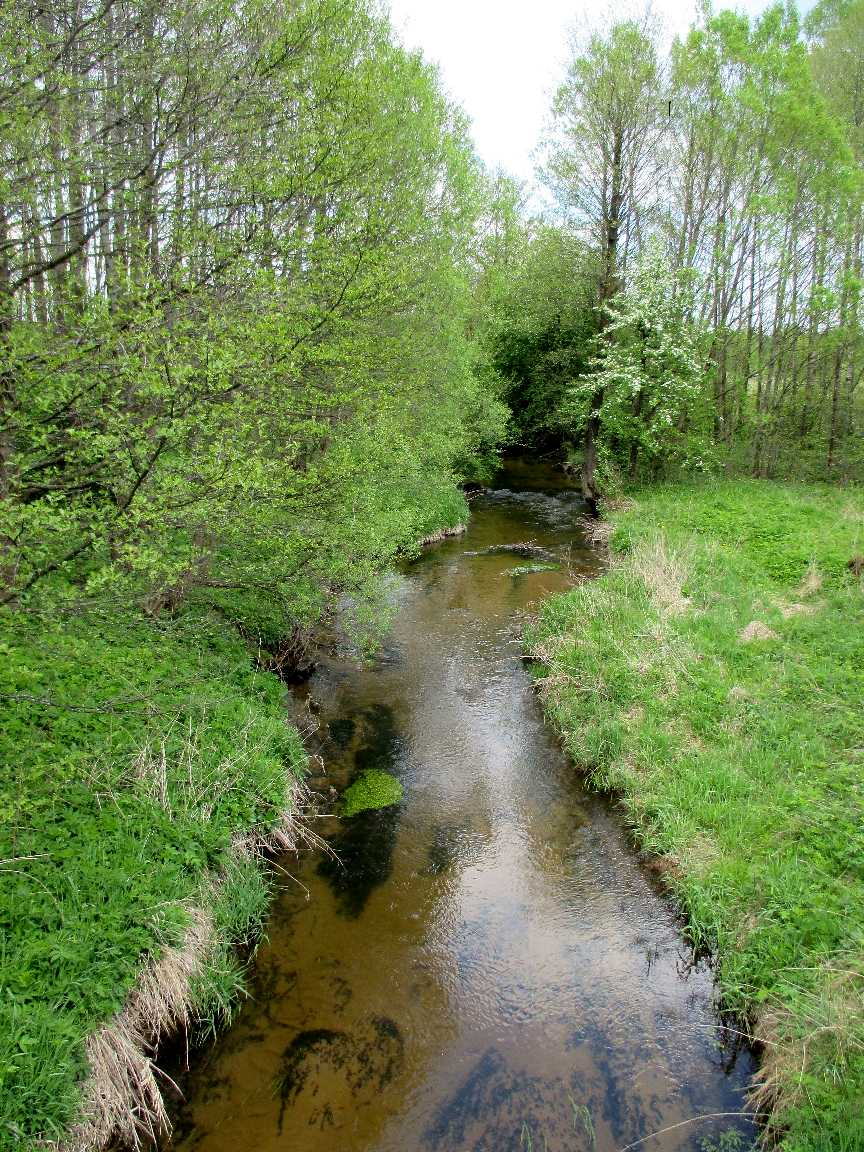 Рака Промша каля в. Вусце, Дзятлаўскі раён